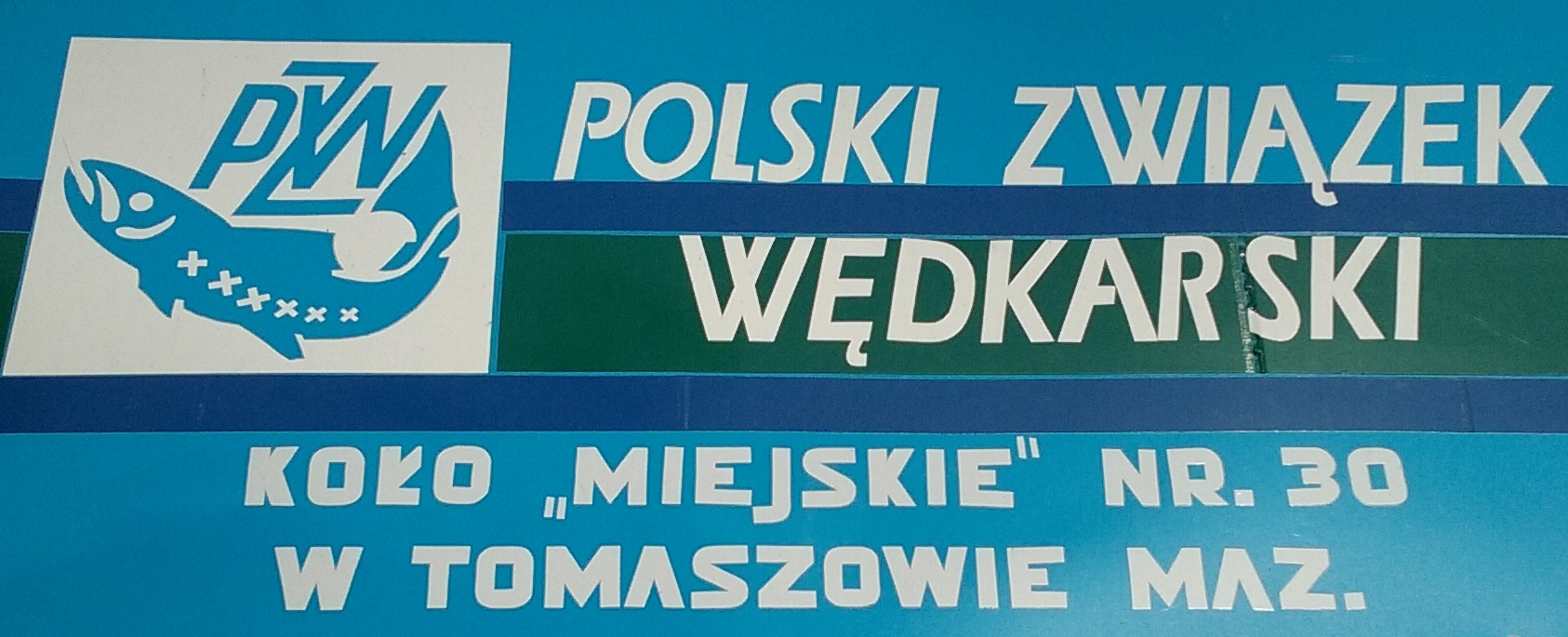 Polski Związek Wędkarski – Koło Miejskie nr 30 w Tomaszowie Mazowieckim, szyld z ulicy Grunwaldzkiej, marzec 2020